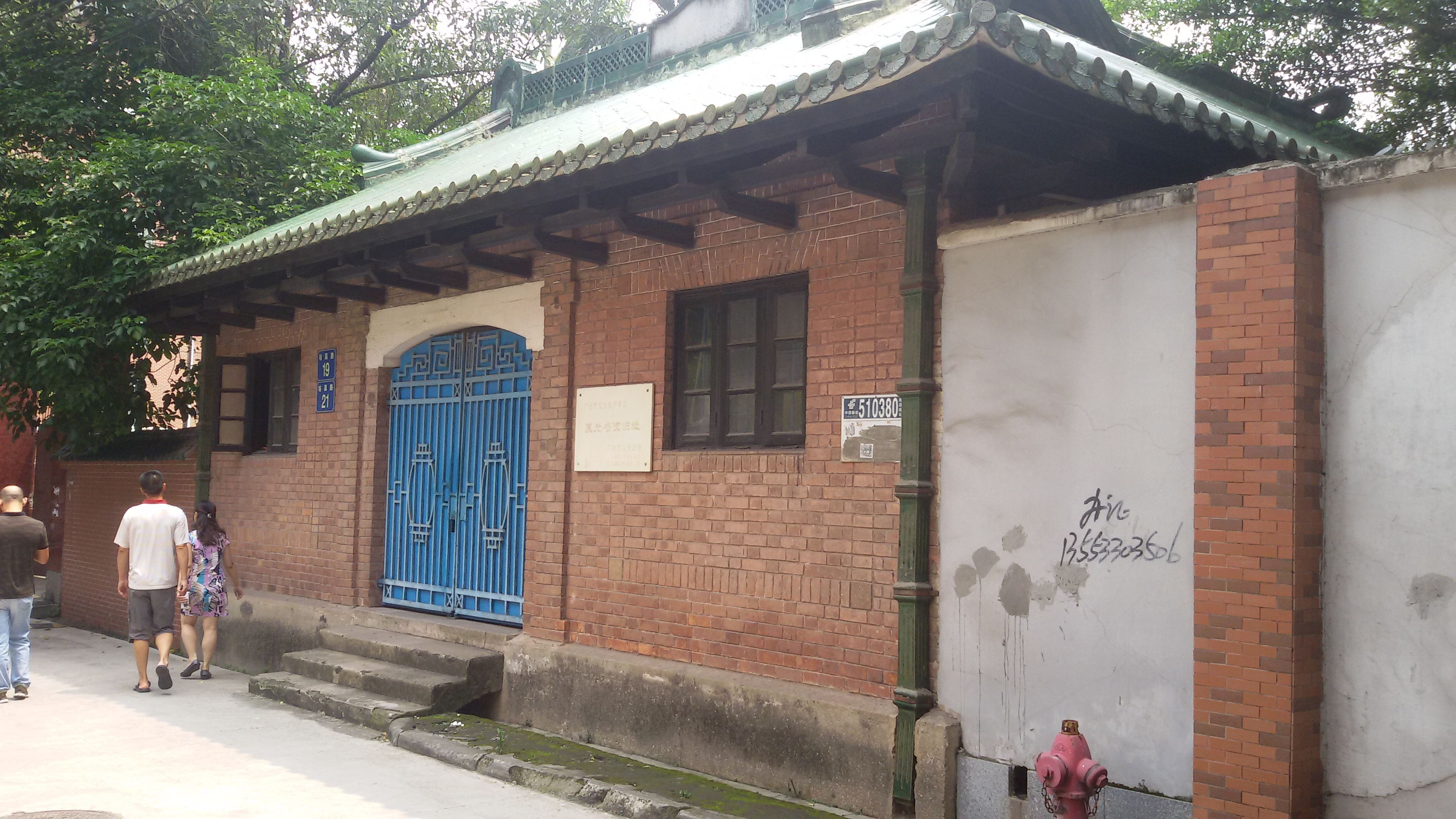 粵語: 真光書院舊址